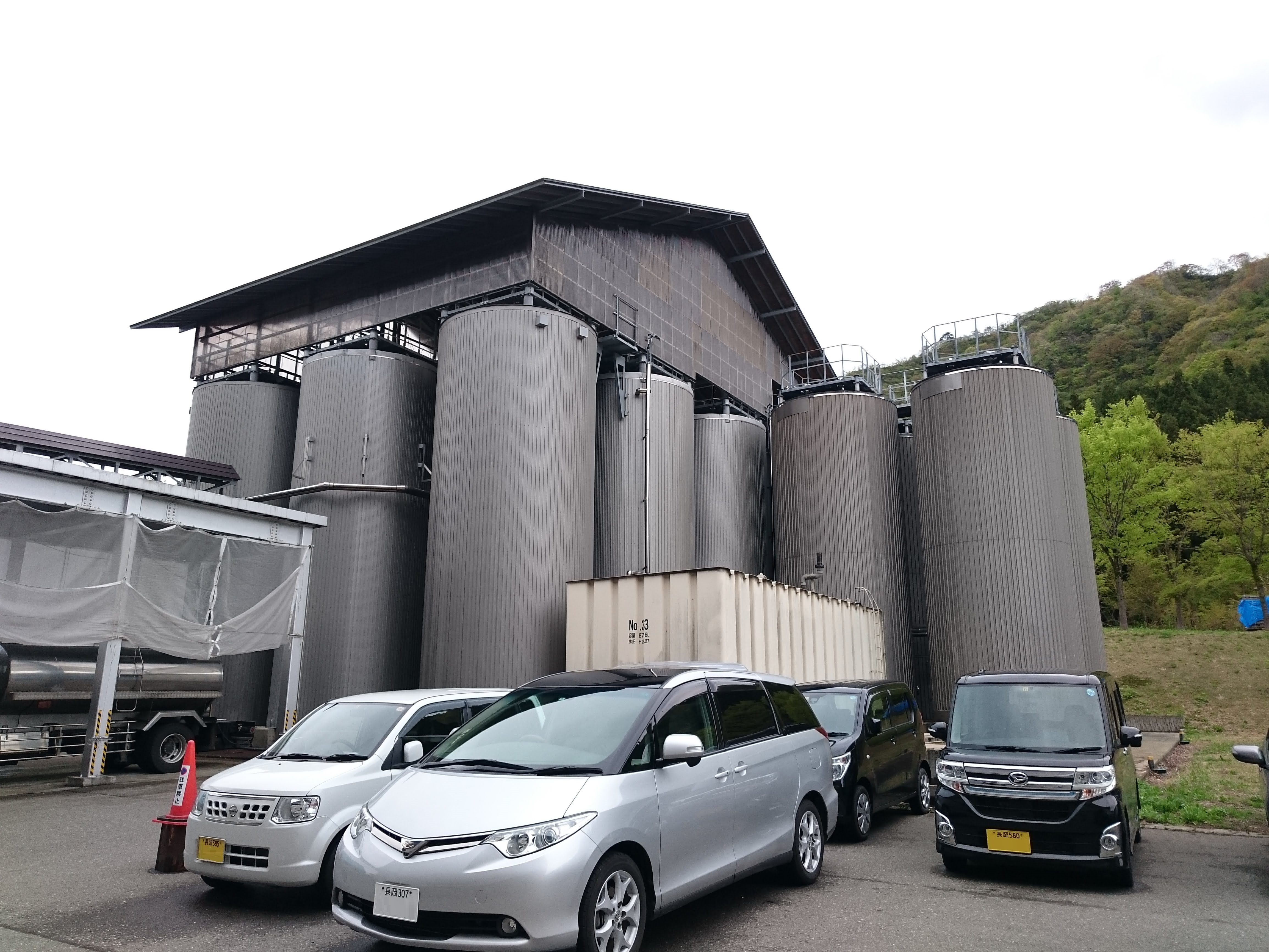 八海醸造の工場